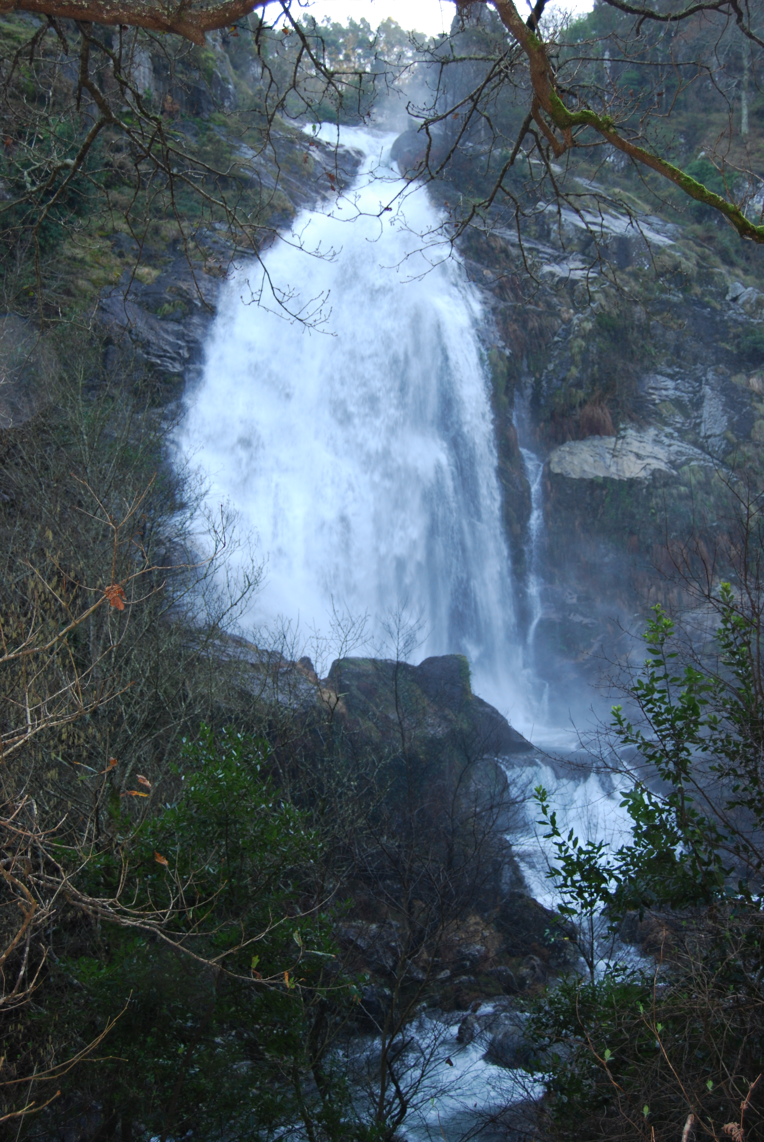 Fervenza en Viladonelle, Fene